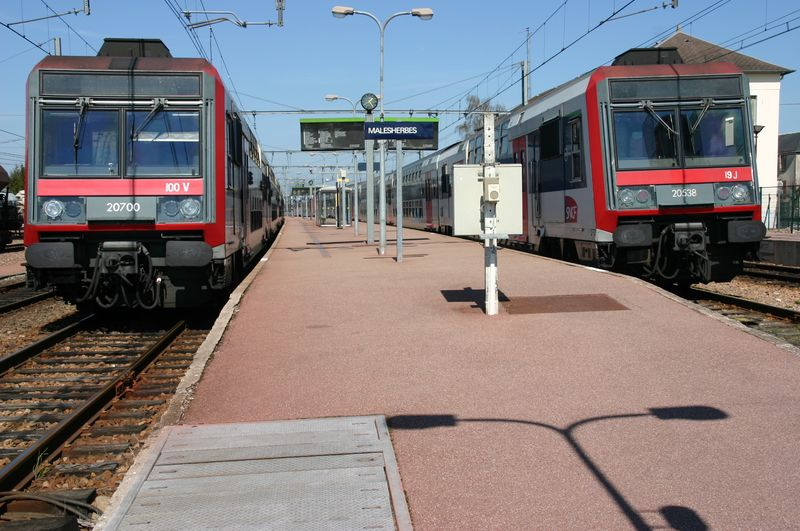 Ancienne Gare de Malesherbes. 2 rames Z20500 garées Voie B (à droite) et voie C (à gauche). Elles assureront des missions pour Paris ou Villiers Le Bel.